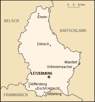 Sujet: Kaart vu Lëtzebuerg Source: Franséisch Wikipedia Lizenz: Domaine public